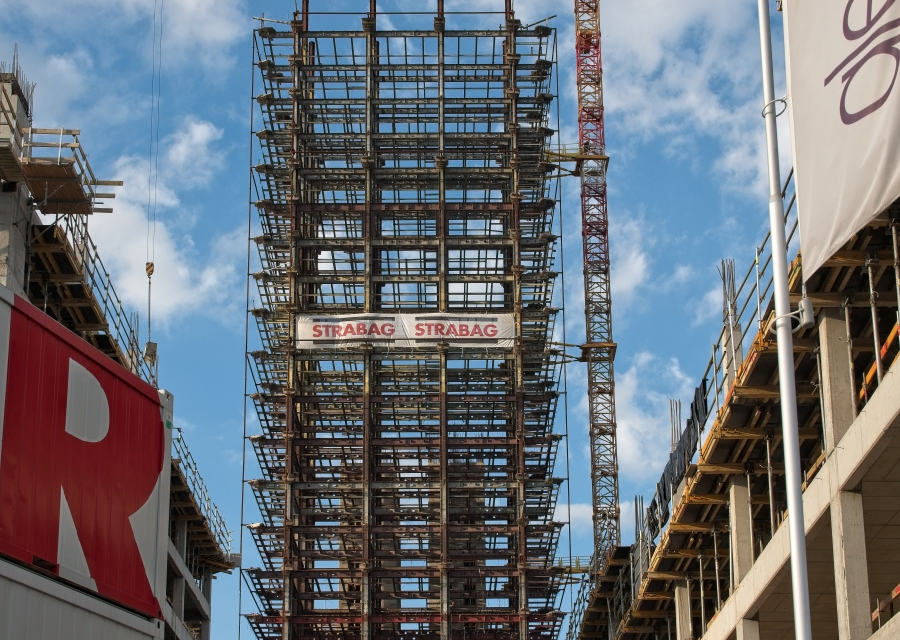 szkieletor Kraków stanː 20180928